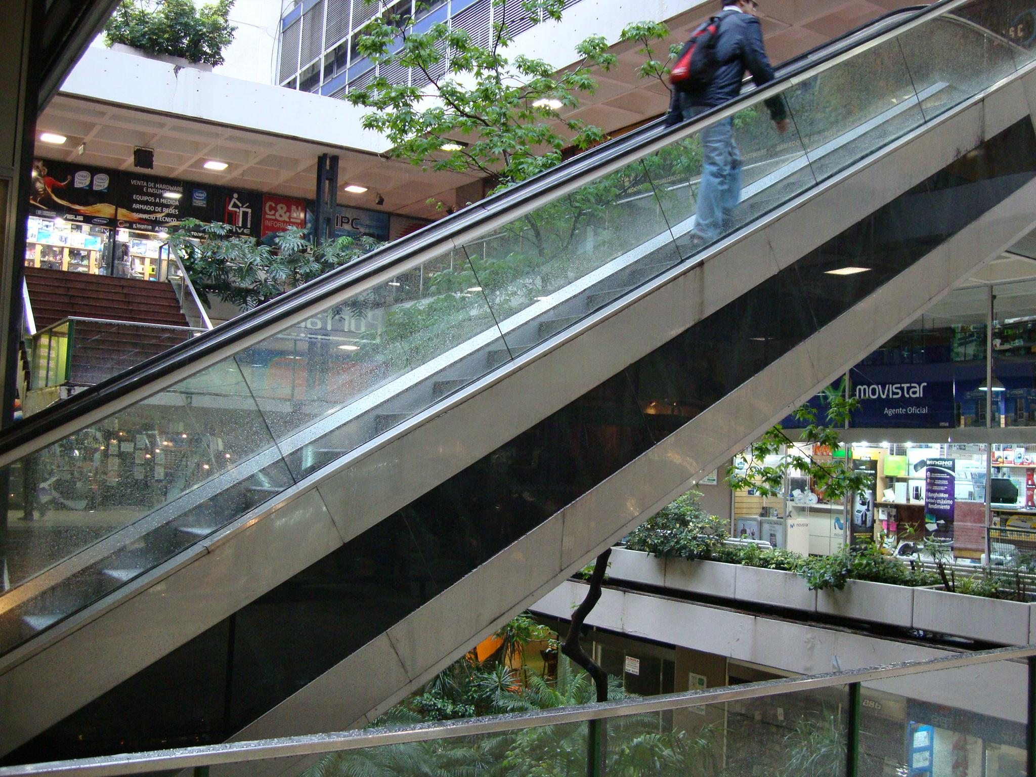 Interior y escalera mecánica en la Galería Jardín. Calle Florida nº 559. Barrio de San Nicolás, ciudad de Buenos Aires, Argentina.